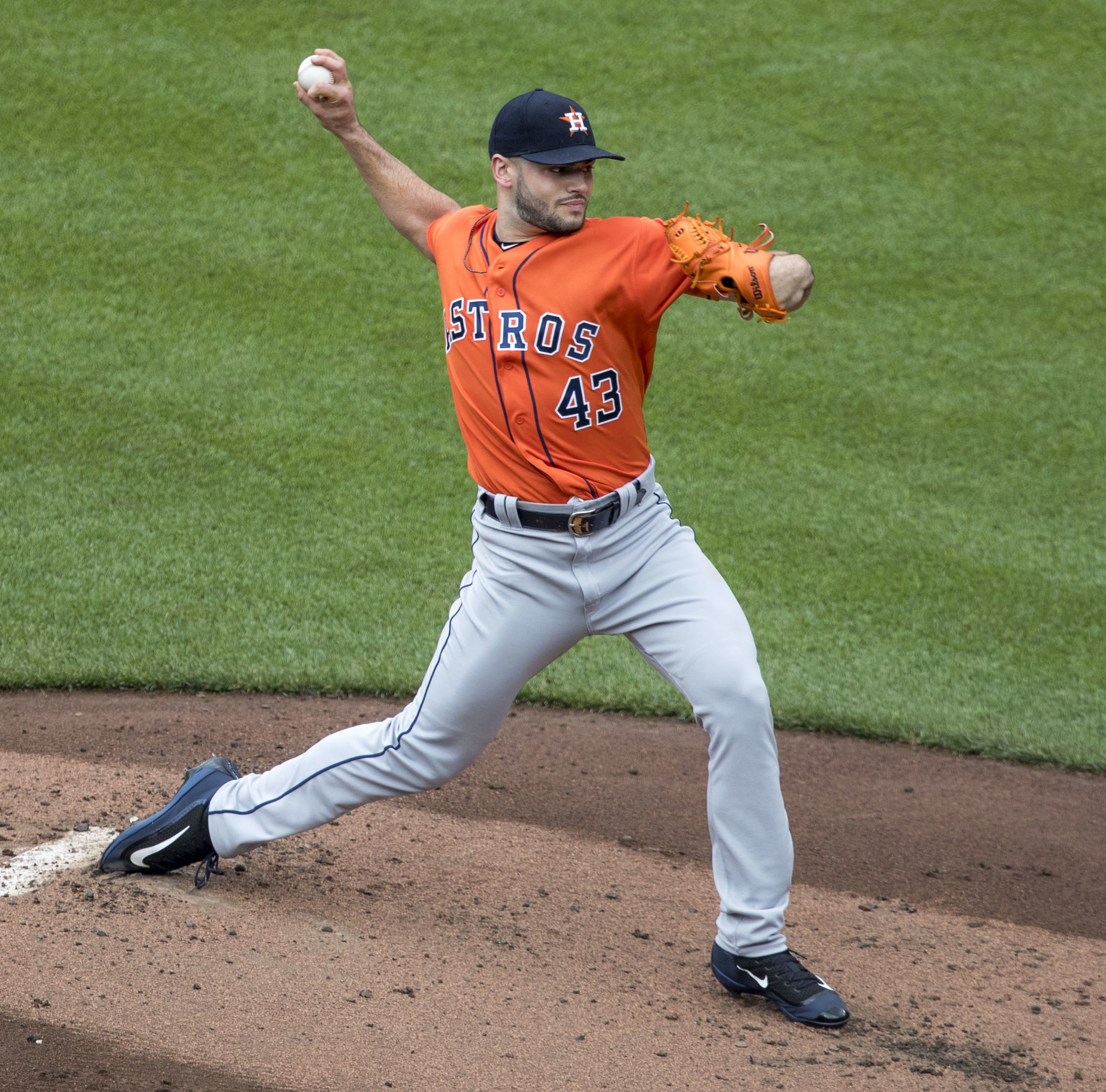 Astros at Orioles 7/23/17